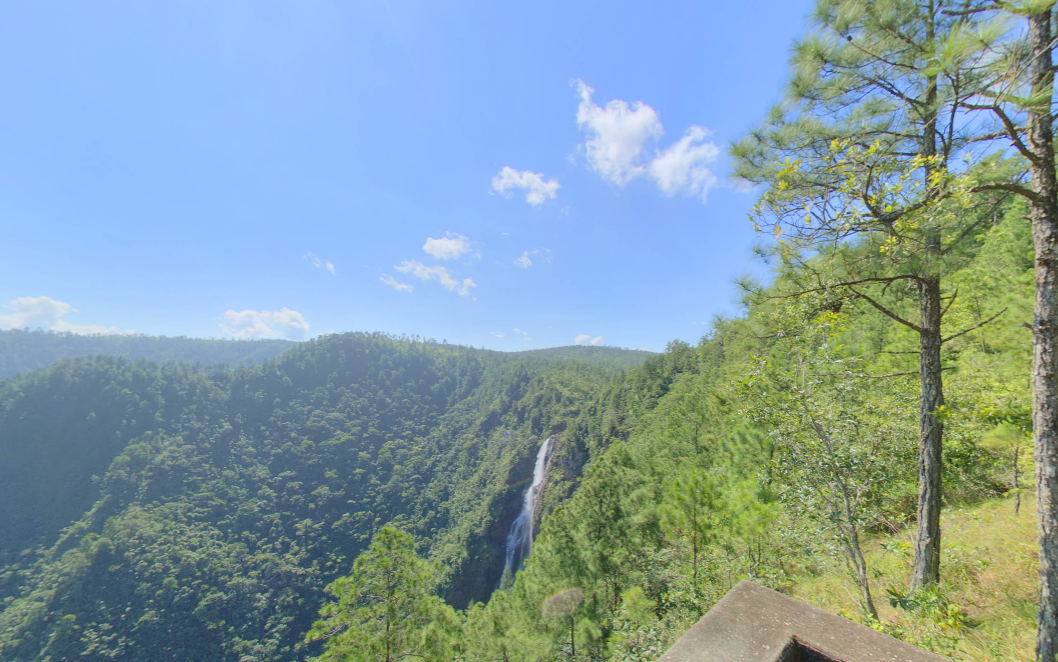 Corozal, Belize